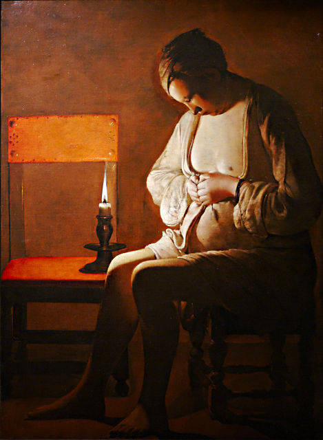 Femme à la puce, Georges de la Tour, collection musée historique lorrain, Nancy